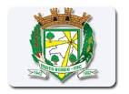 Brasão de Armas da Cidade de Mata Verde - MG